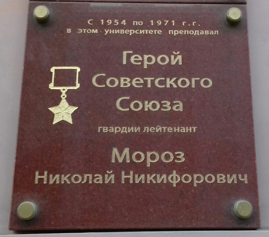 Памятная доска на здании Ростовского государственного экономического университета